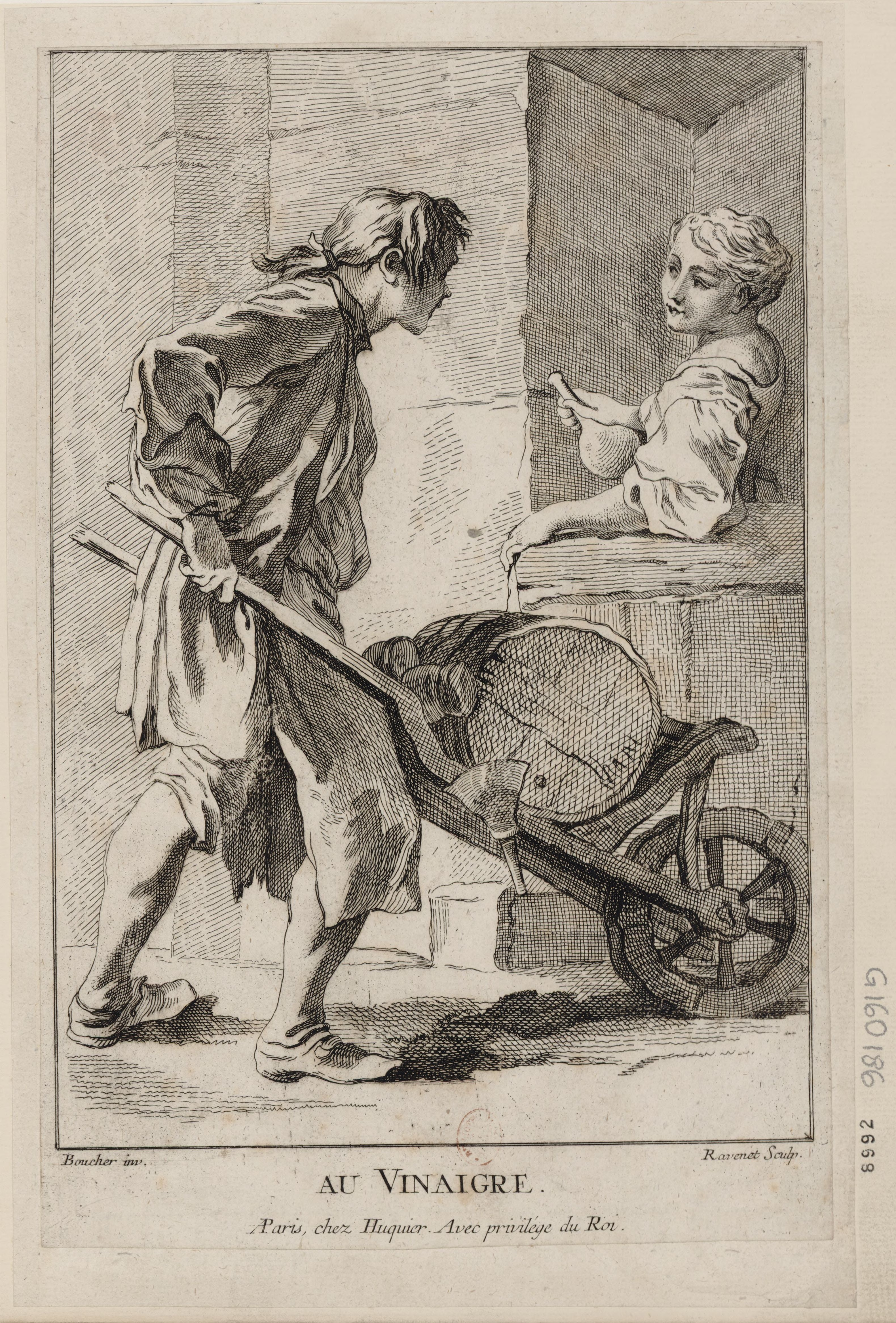 Au Vinaigre estampe de François Boucher gravée par Simon François Ravenet.